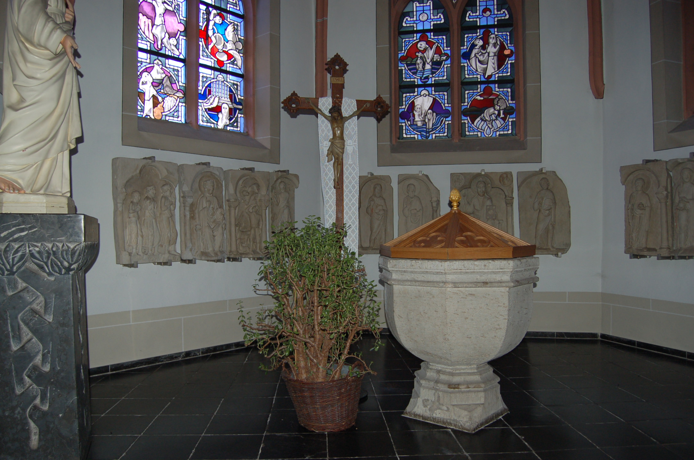 Gustorfer Chorschranken (Germany)